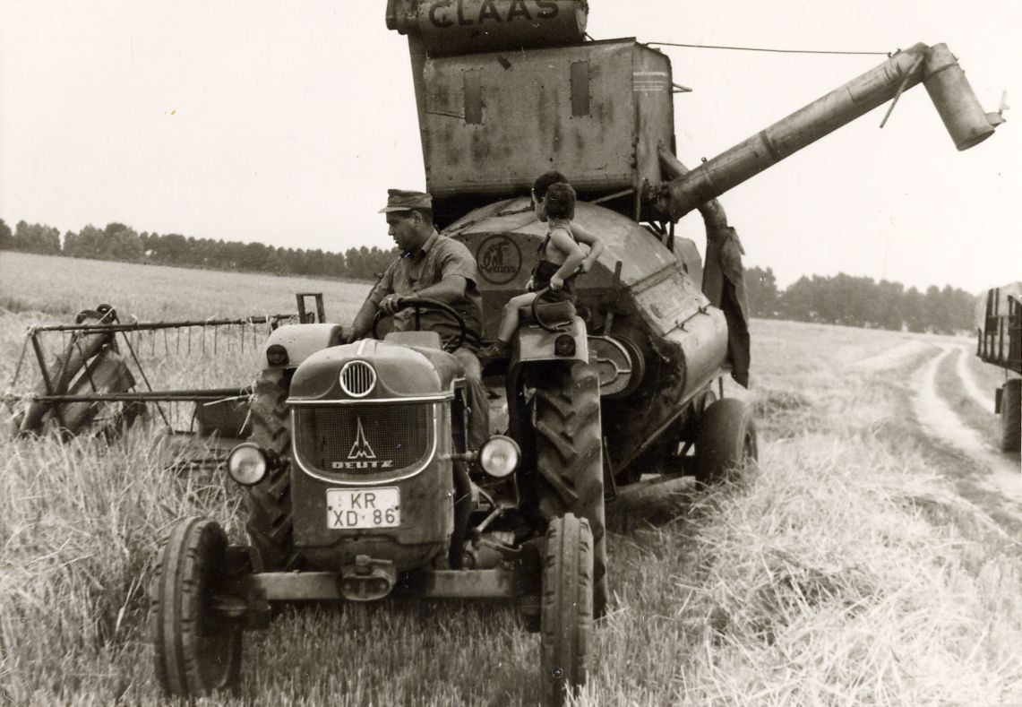 Haus Traar – Deutz D40 vor Claas Super Mähdrescher, im Hintergrund das Löken, heute durchkreuzt von der Autobahn A57